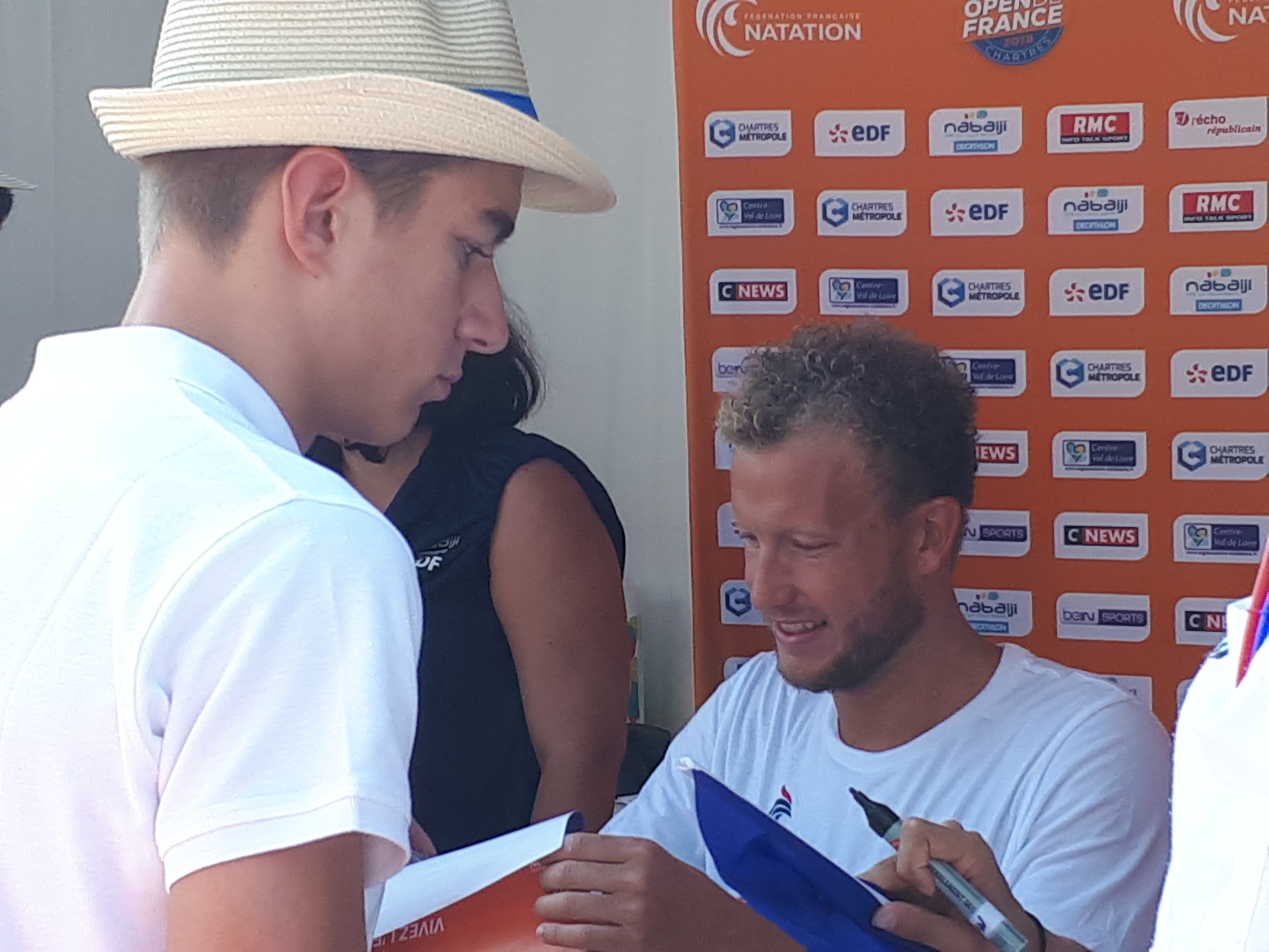 Open de France de Natation 2018 à Chartres. Damien Joly pendant la séance de dédicaces.